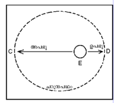 apogee and perijee of earth